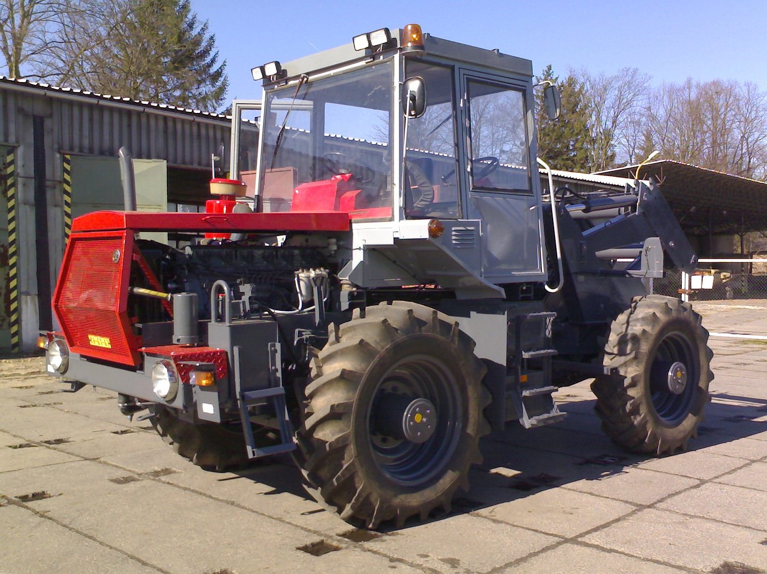 oprava a celková repase kolového traktoru / nakladače ŠT180N